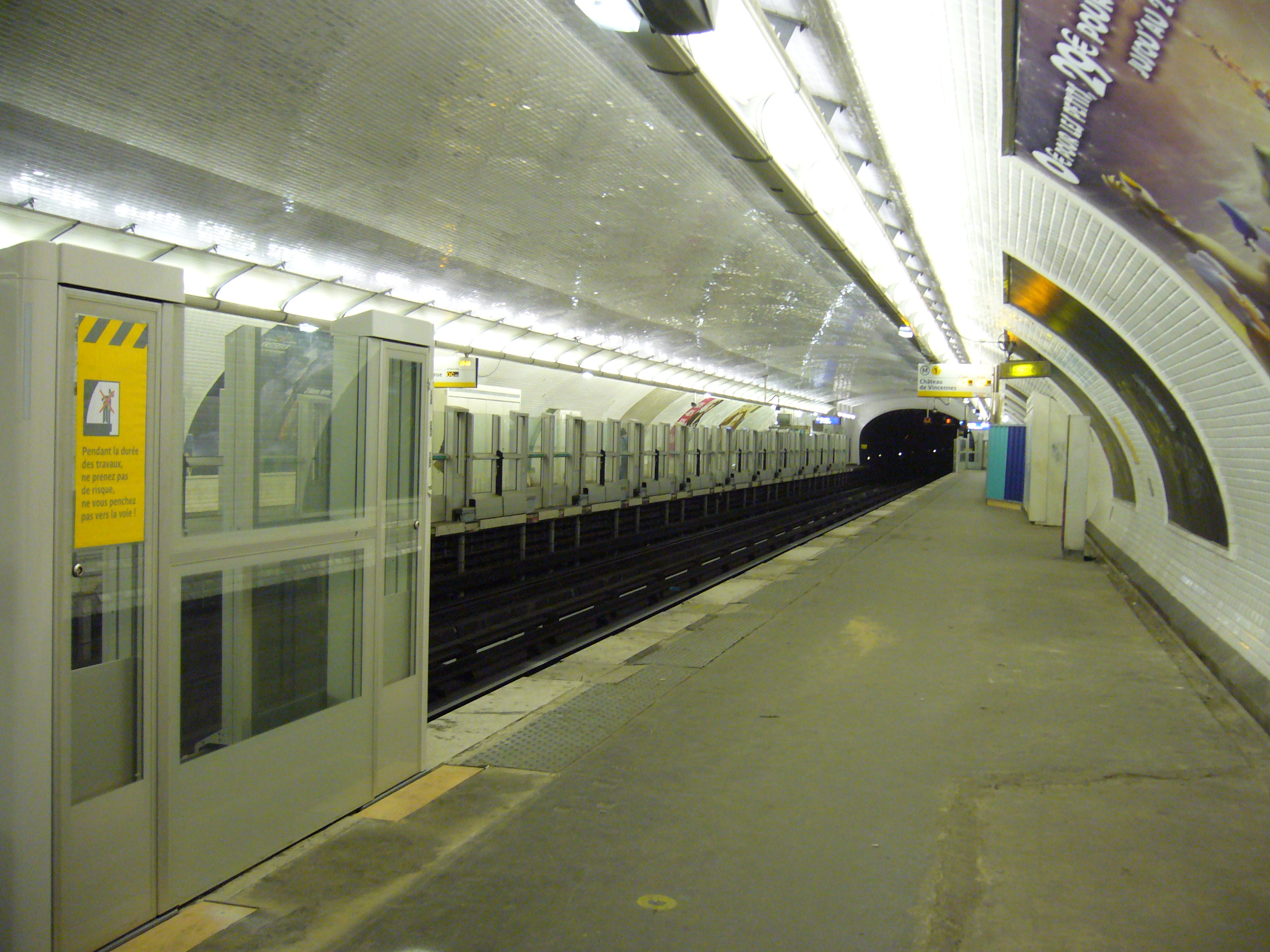 Installation des façades de quai à Bérault sur la ligne 1 du métro de Paris.